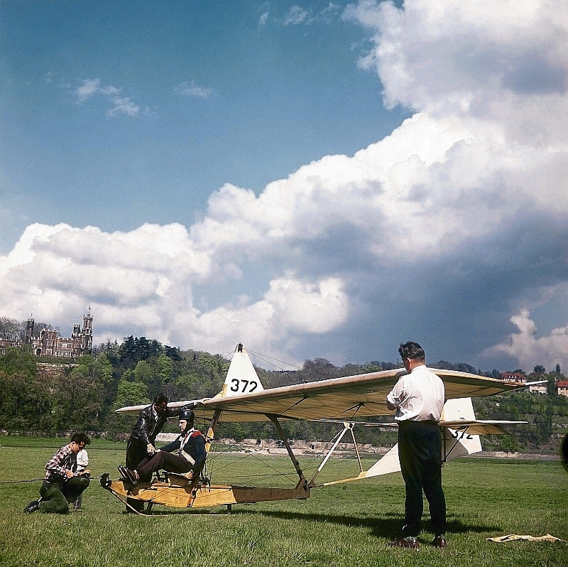 Original image description from the Deutsche Fotothek Dresden. GST-Segelfluggelände Dresden-Elbwiese, Schulgleiter SG 38 am Startpunkt, am Bug Helfer beim Einhängen des Stahldraht-Schleppseils in den Schlepphaken